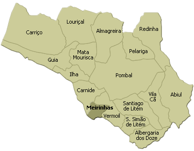 localisation de meirinhas dans la freguesia de pombal